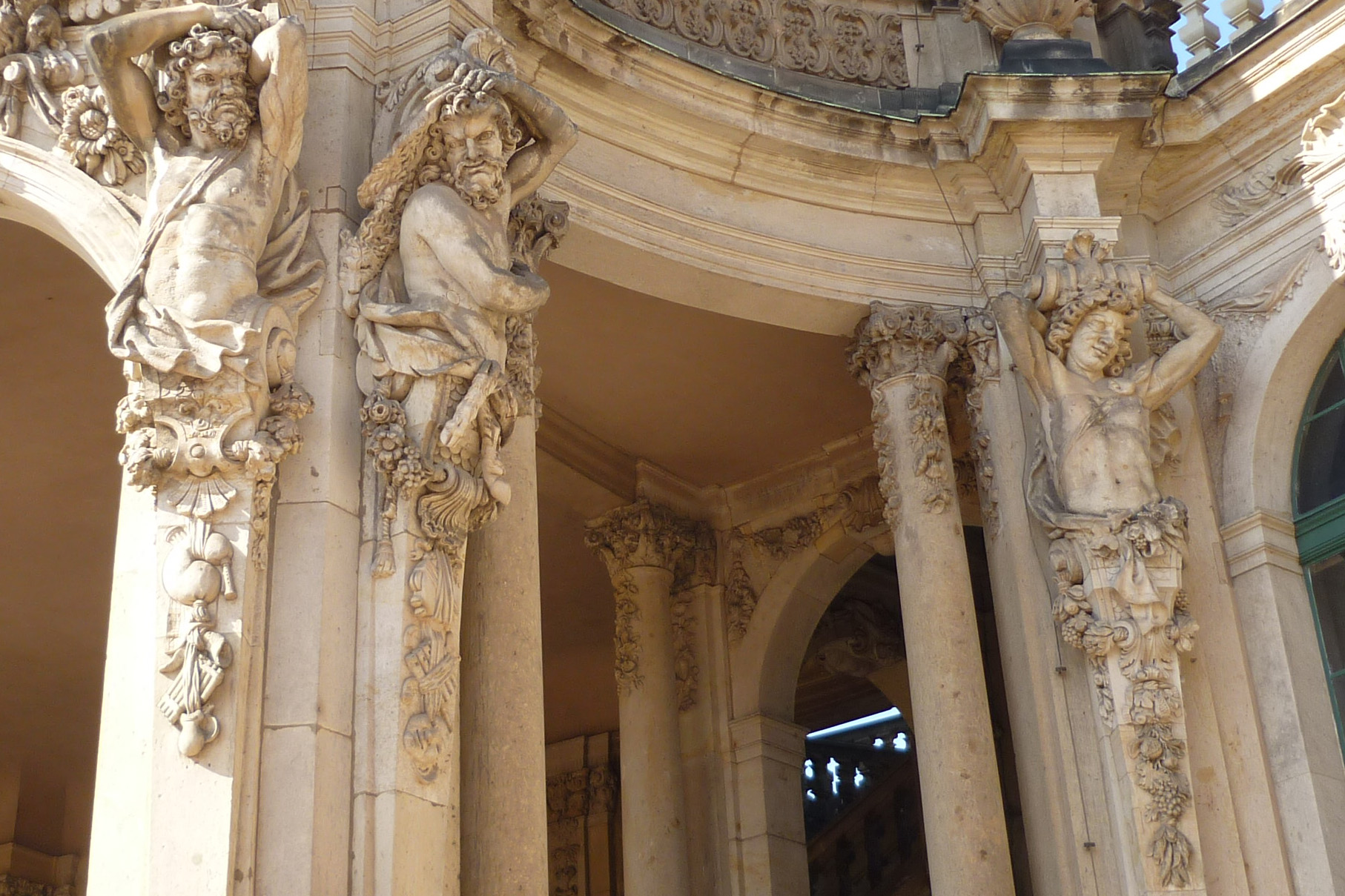 Hermen am Wallpavillon des Dresdner Zwinger, rechte Gruppe